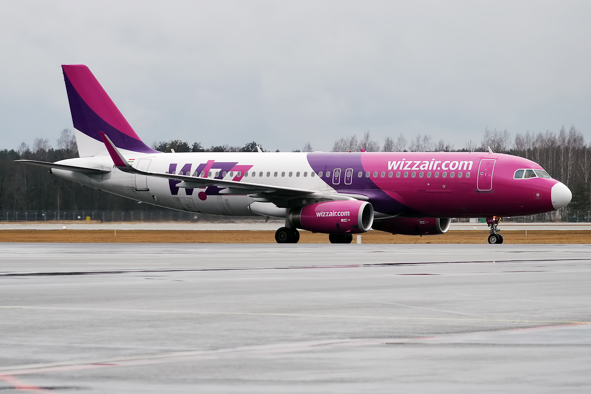 Wizz Air, HA-LWX, Airbus A320-232